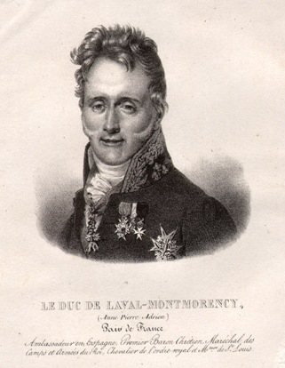 Anne-Adrien-Pierre de Montmorency-Laval, duc de Laval et de San Fernando Luis, né à Paris le 29 octobre 1768 et mort à Paris le 6 juin 1837, est un diplomate et homme politique français.